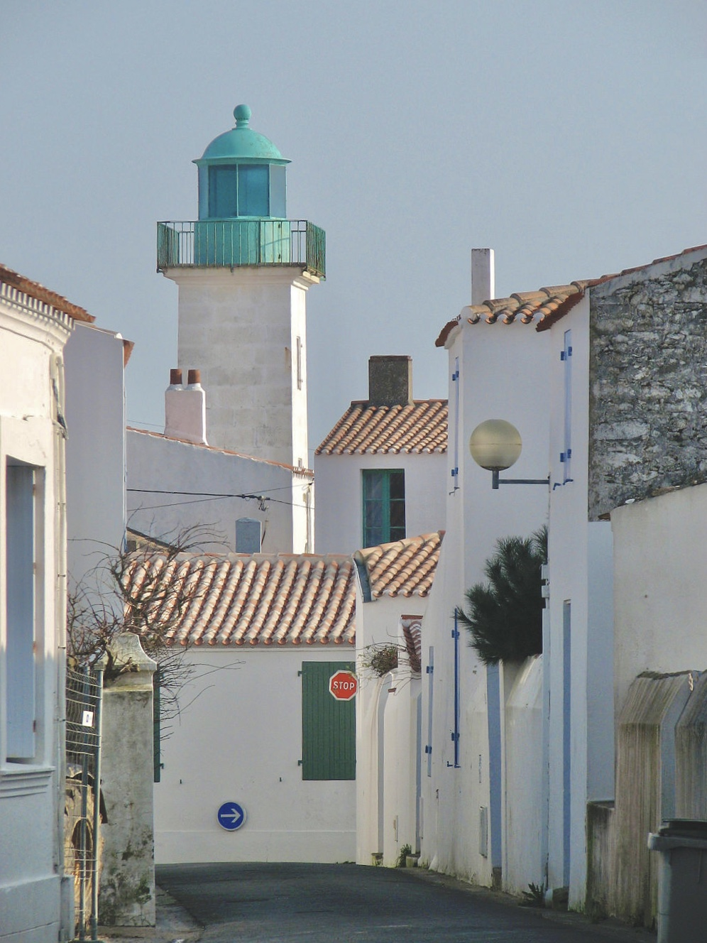 Phare de Port-Joinville depuis la rue du Secret, l'Île d'Yeu (Vendée, Pays de la Loire, France)